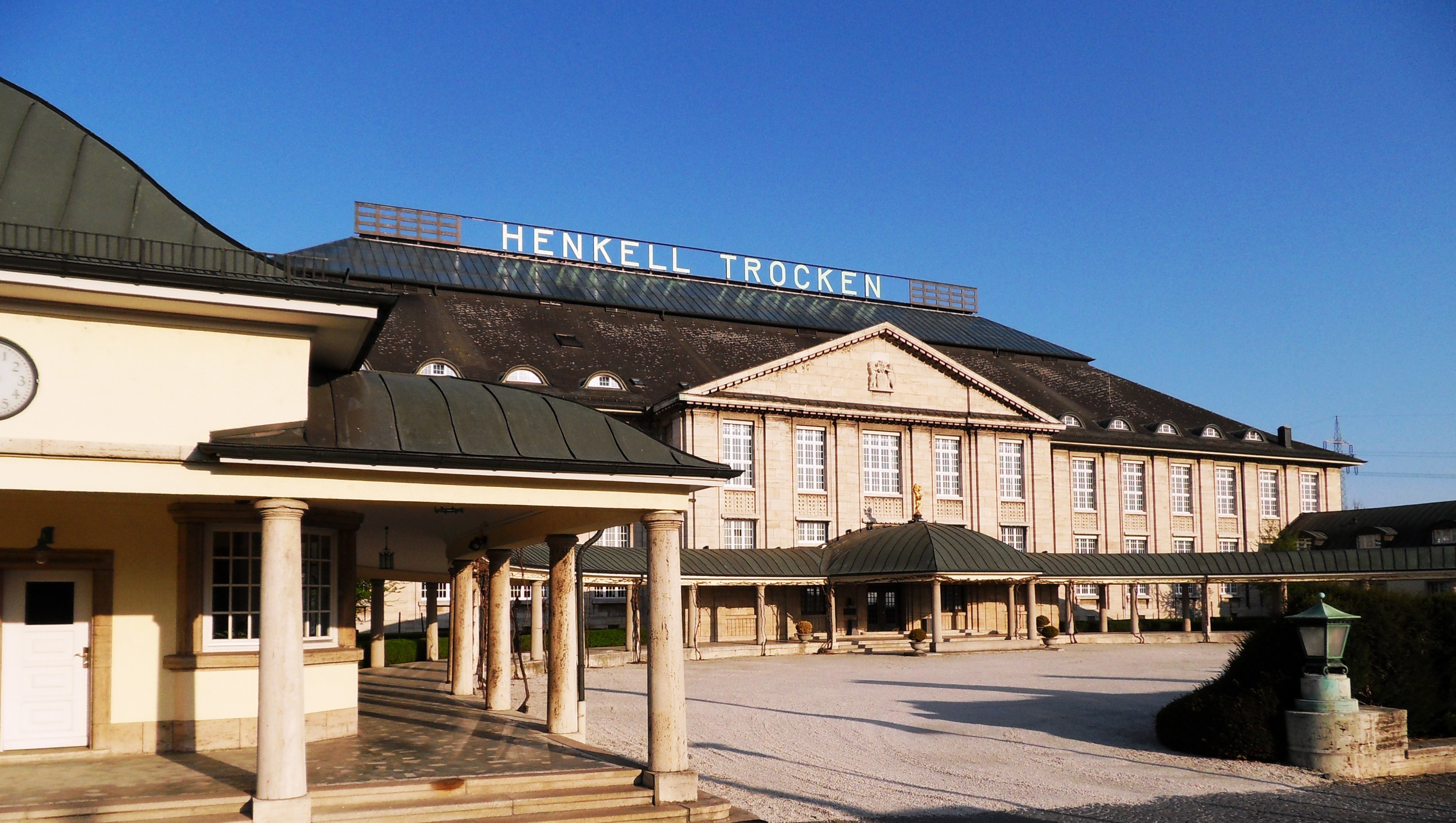 Henkell-Schlösschen an der Biebricher Allee in Wiesbaden-Biebrich, Blick von Nordwesten.